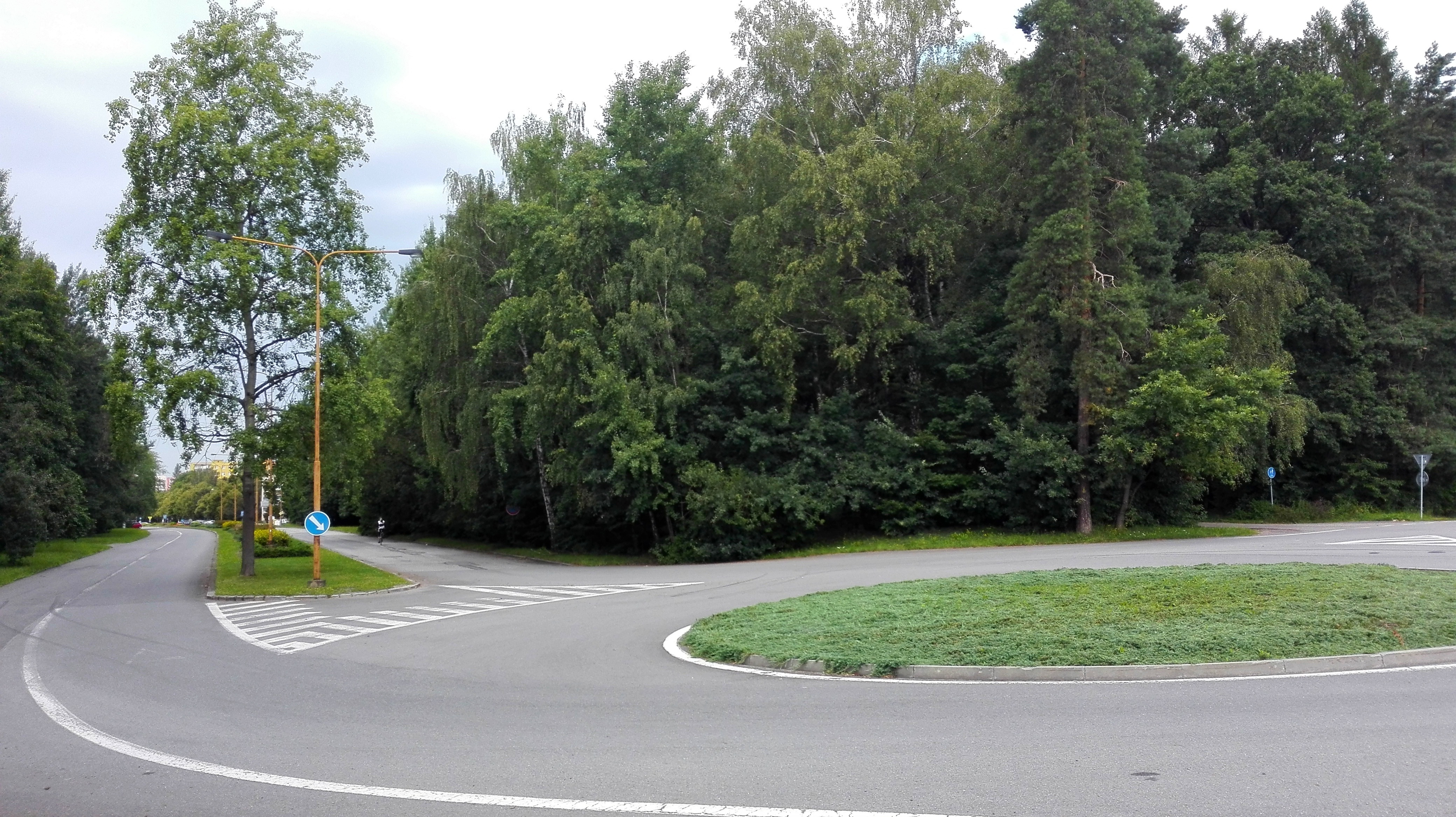 Havířov - Podlesí, kruhový objezd na horním konci Dlouhé třídy na křižovatce s ulicí Přátelství. Původně měl sloužit jako točna trolejbusů - projekt trolejbusové dopravy v Havířově však nebyl nikdy realizován.